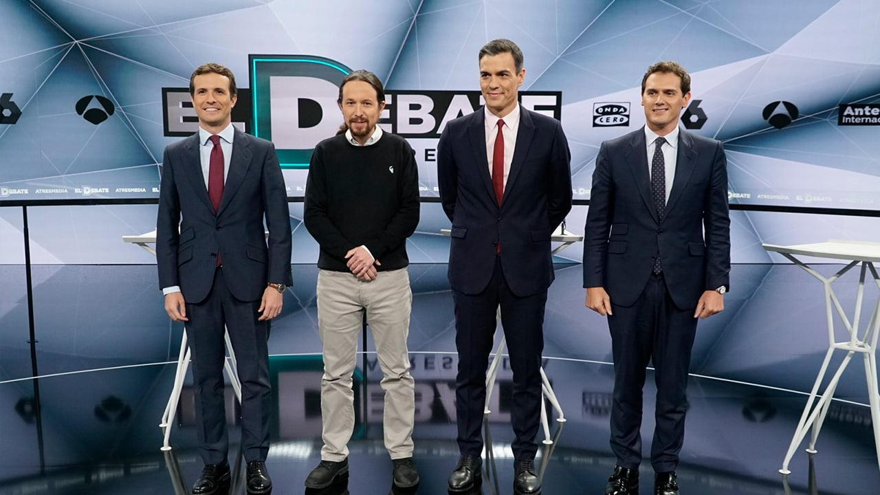 El Debate Decisivo Atresmedia (2019)